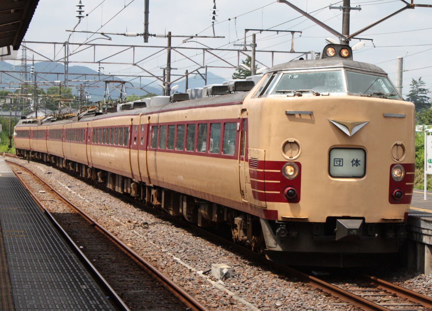 新潟車両センター 485系国鉄色T18編成 友部にて